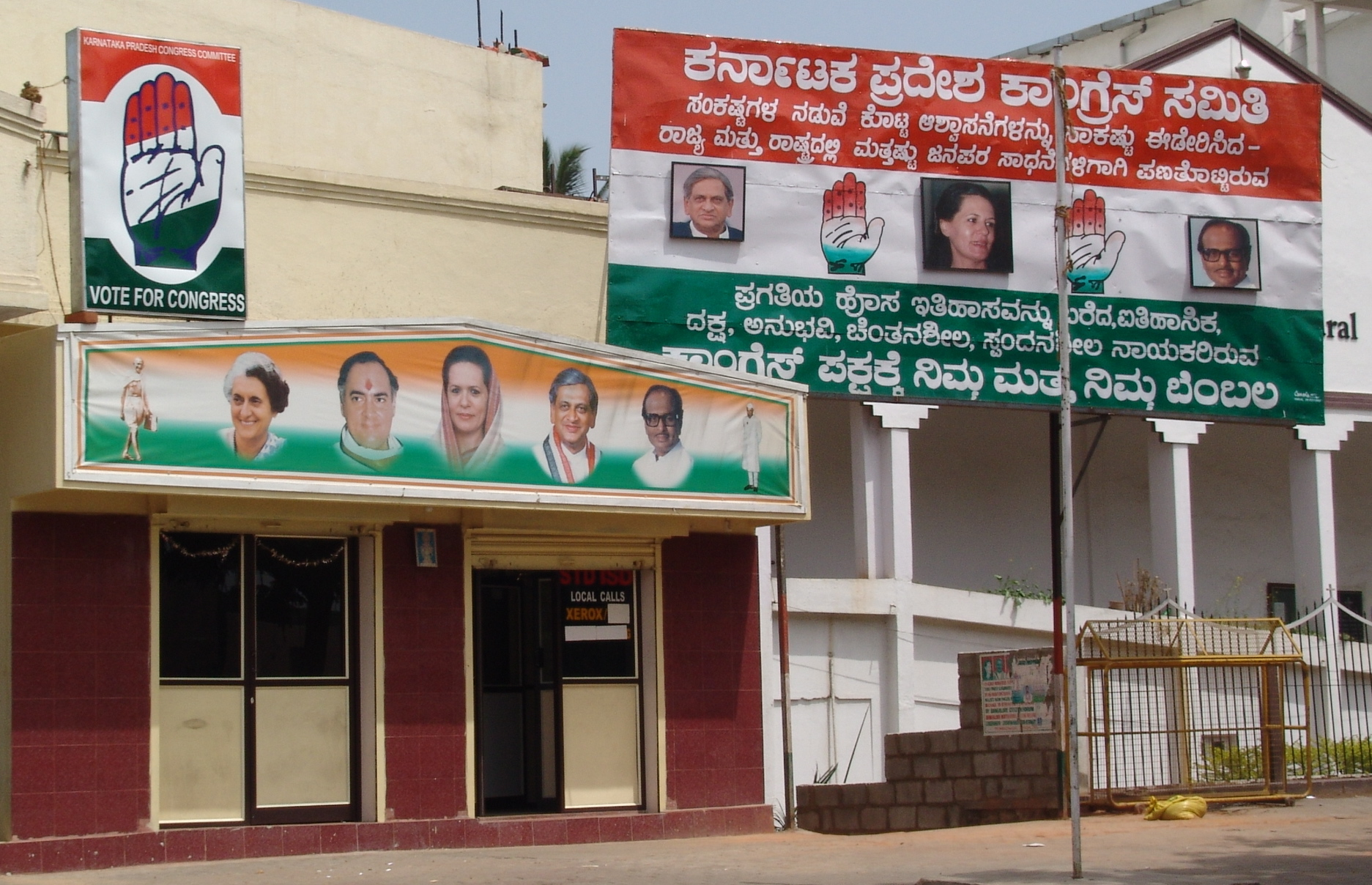 Bangalore